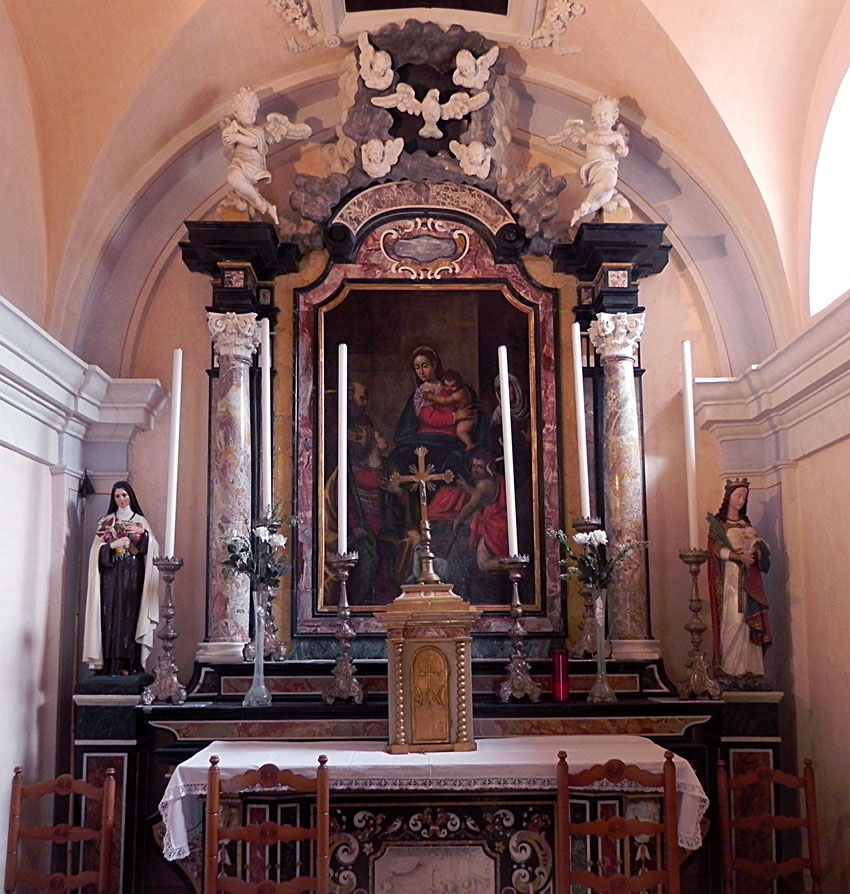 Gorno, l'altare della Chiesa della Madonna delle Grazie.